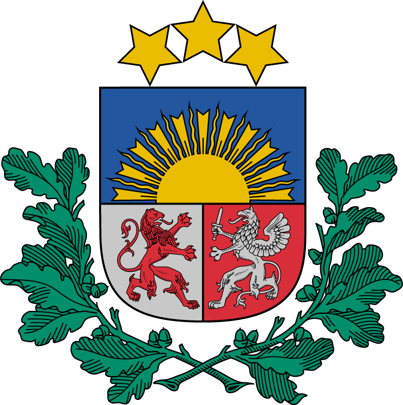 Беларуская (тарашкевіца): Малы пашыраны герб Латвійскай рэспублікі.